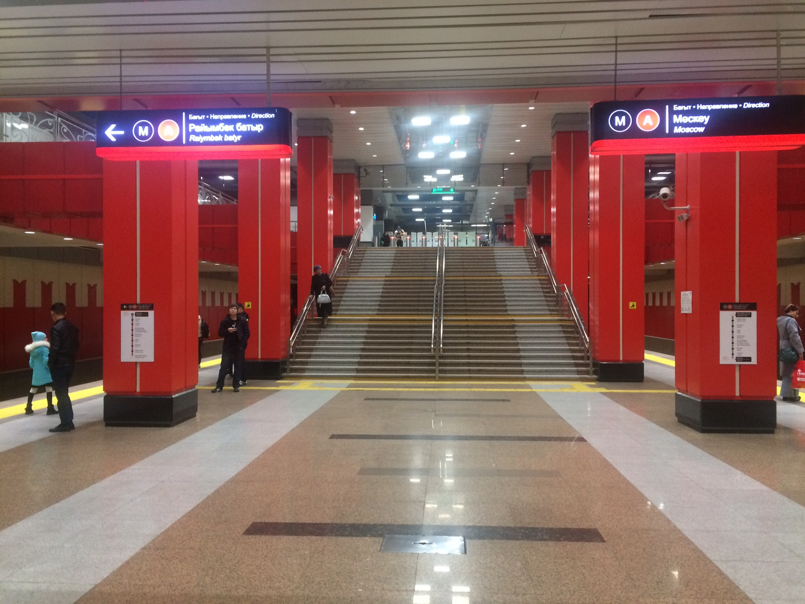 Станция метро "Москва" в Алматы